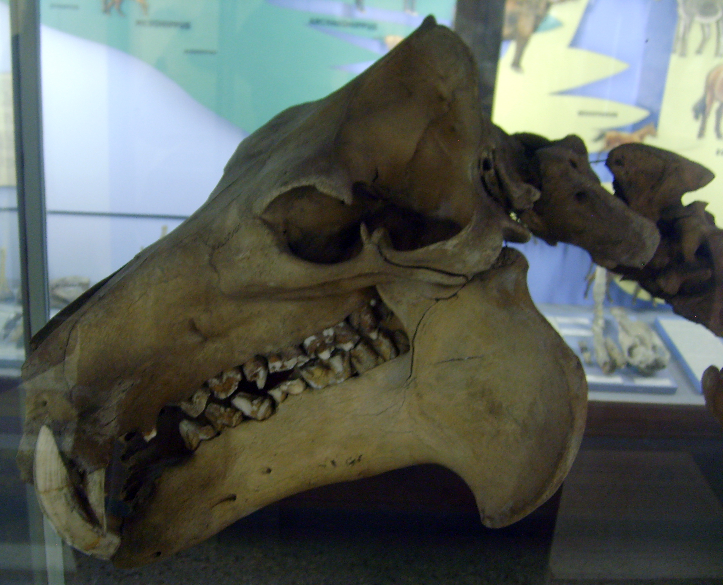 Hippopotamus lemerlei skull at the Museum für Naturkunde, Berlin.